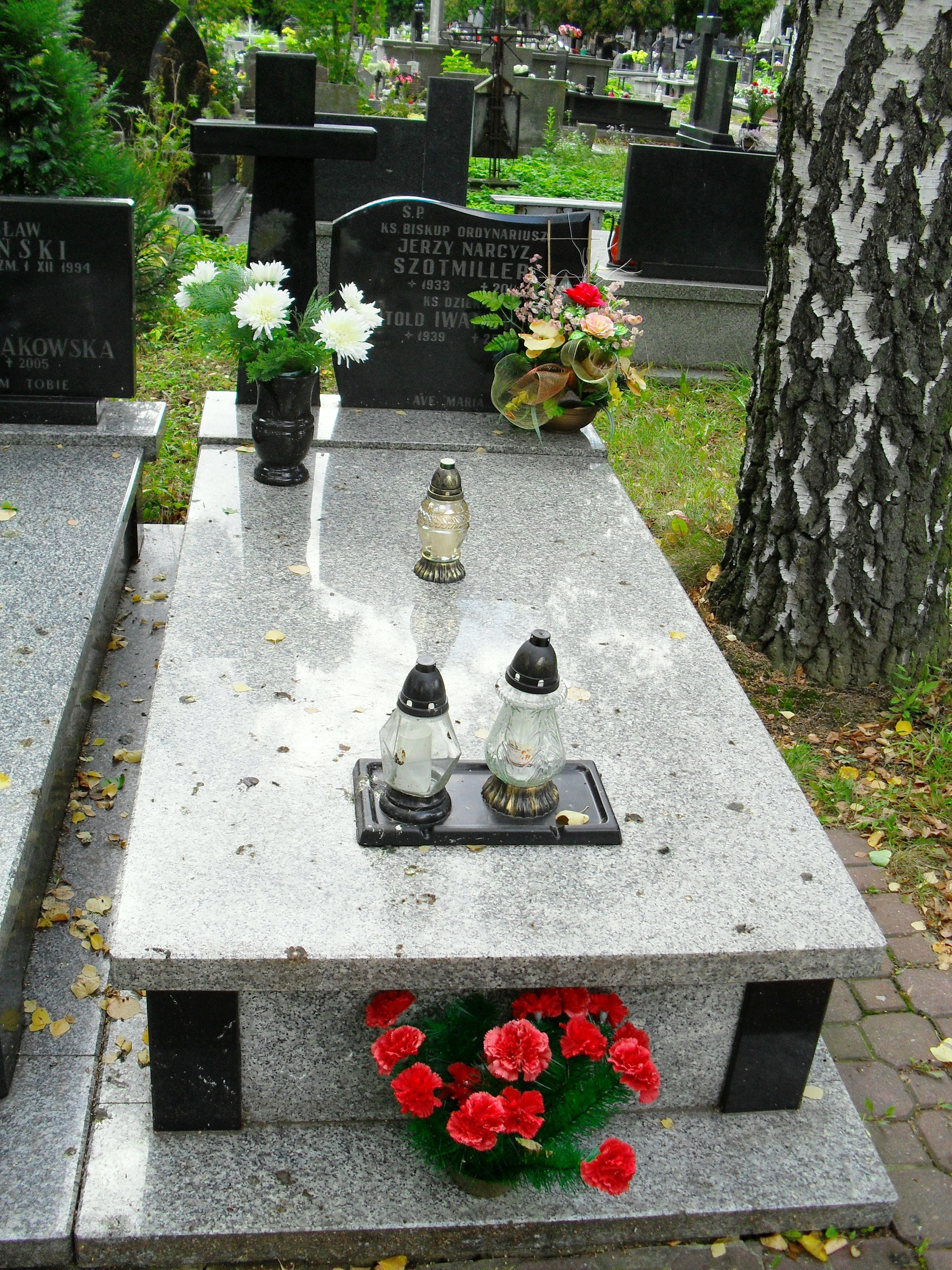 Nagrobek śp. JE bp. Kościoła Polskokatolickiego Jerzego Szotmillera